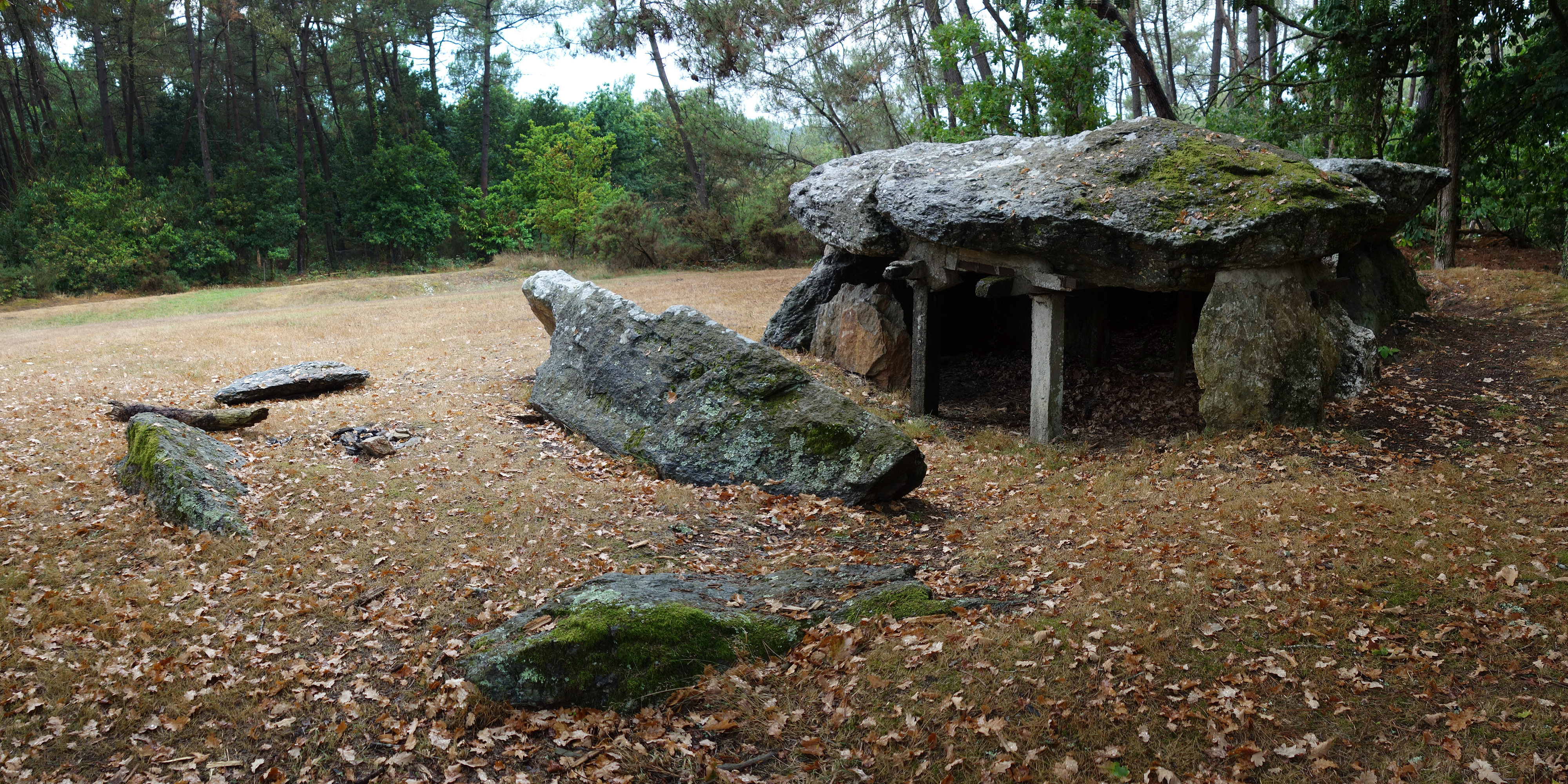 Tout près de la Gacilly, au-delà de l'Aff vers les hauteurs au sud-est, voici « Les Tablettes de Cournon », un grand dolmen de type Angevin, orienté sud-est, long de 5 m et haut de 1,50 m. Il est constitué de dalles en poudingue dont dix supports et deux dalles couvrantes. Il a été restauré vigoureusement avec des poutrelles en béton.